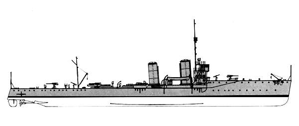 Seitenriss der Poerio-Klasse